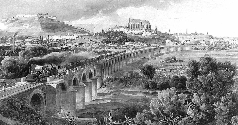 Historický pohled na Brno s viaduktem.